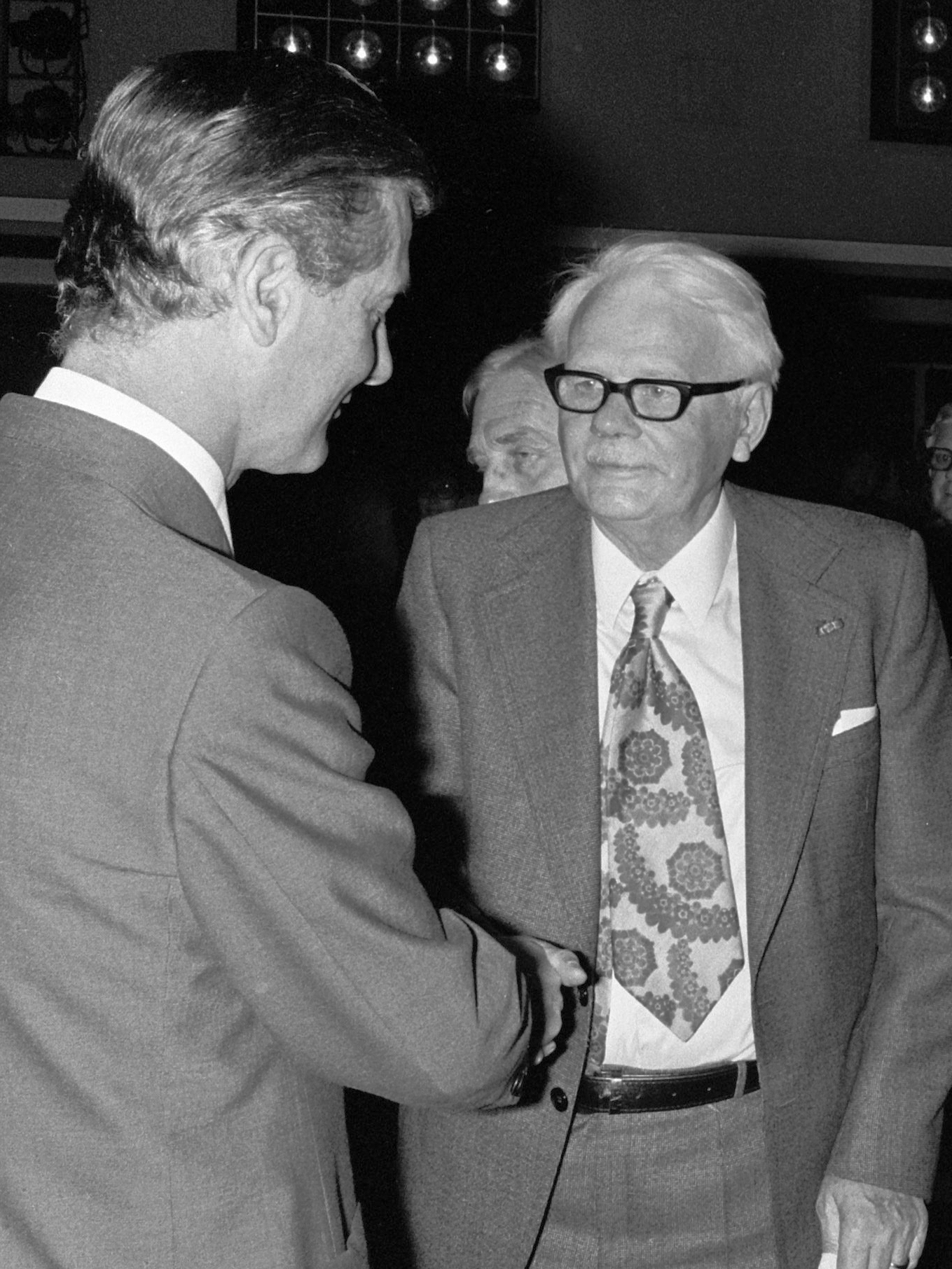 Vergadering van de Anti-Revolutionaire Partij (ARP) in Zwolle; Jan de Koning (links) feliciteert Hendrik Algra 24 mei 1975